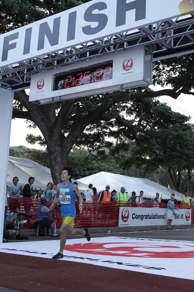 2012年ホノルルマラソンでの原田拓